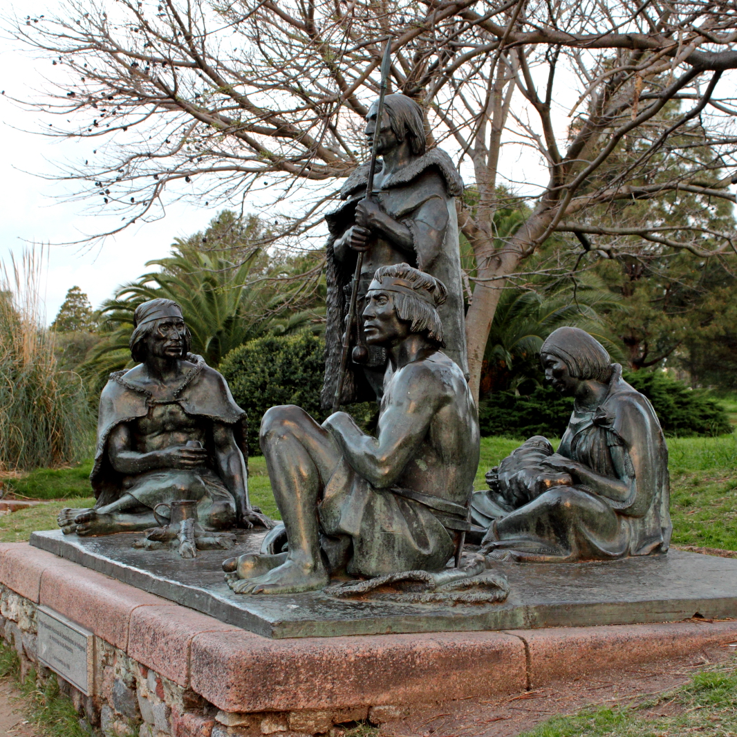 En el Parque del Prado, sobre Av. Delmira Agustini Los últimos charruas. Ubicada en el departamento de Montevideo